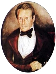 Pedro Molina Mazariegos, Central American (Guatemalan) politician